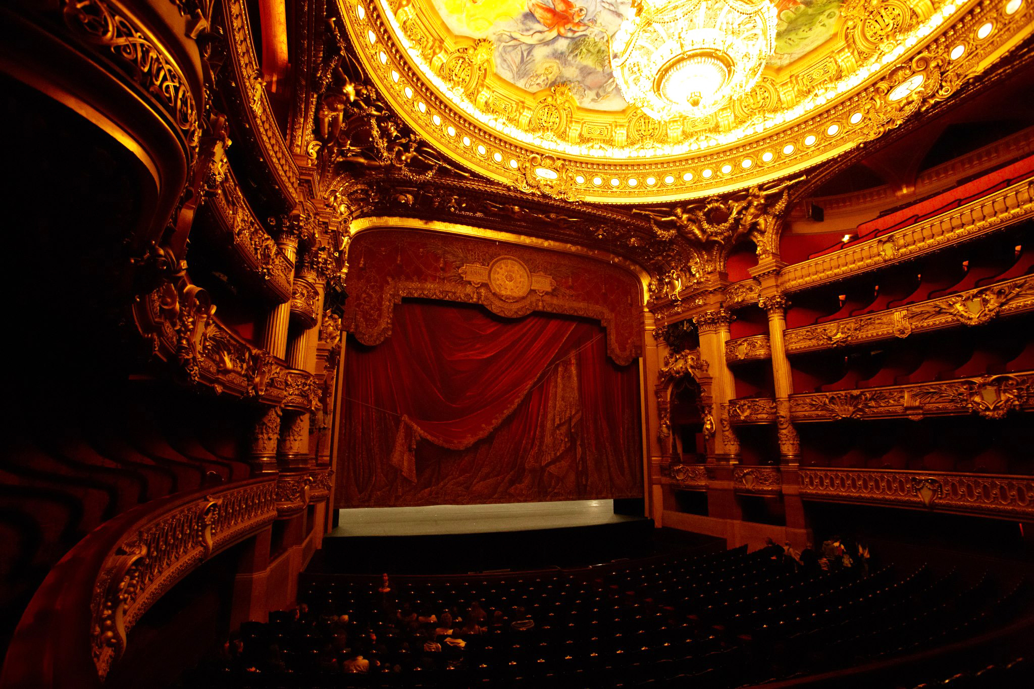 パリ オペラ座 2012年12月27日